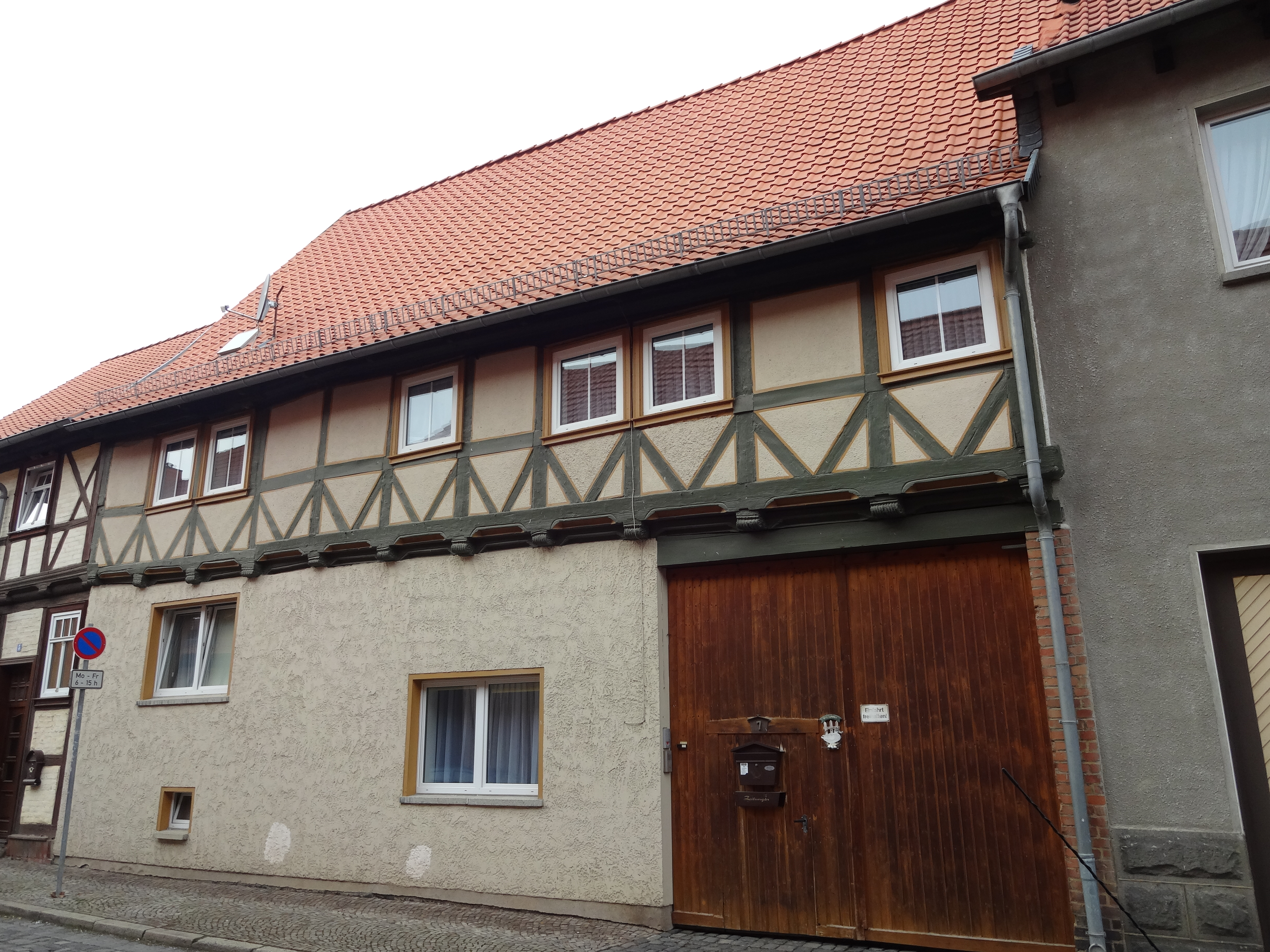 denkmalgeschütztes Fachwerkhaus in der Ueckerstraße 7 Derenburg, Ortsteil von Blankenburg (Harz)